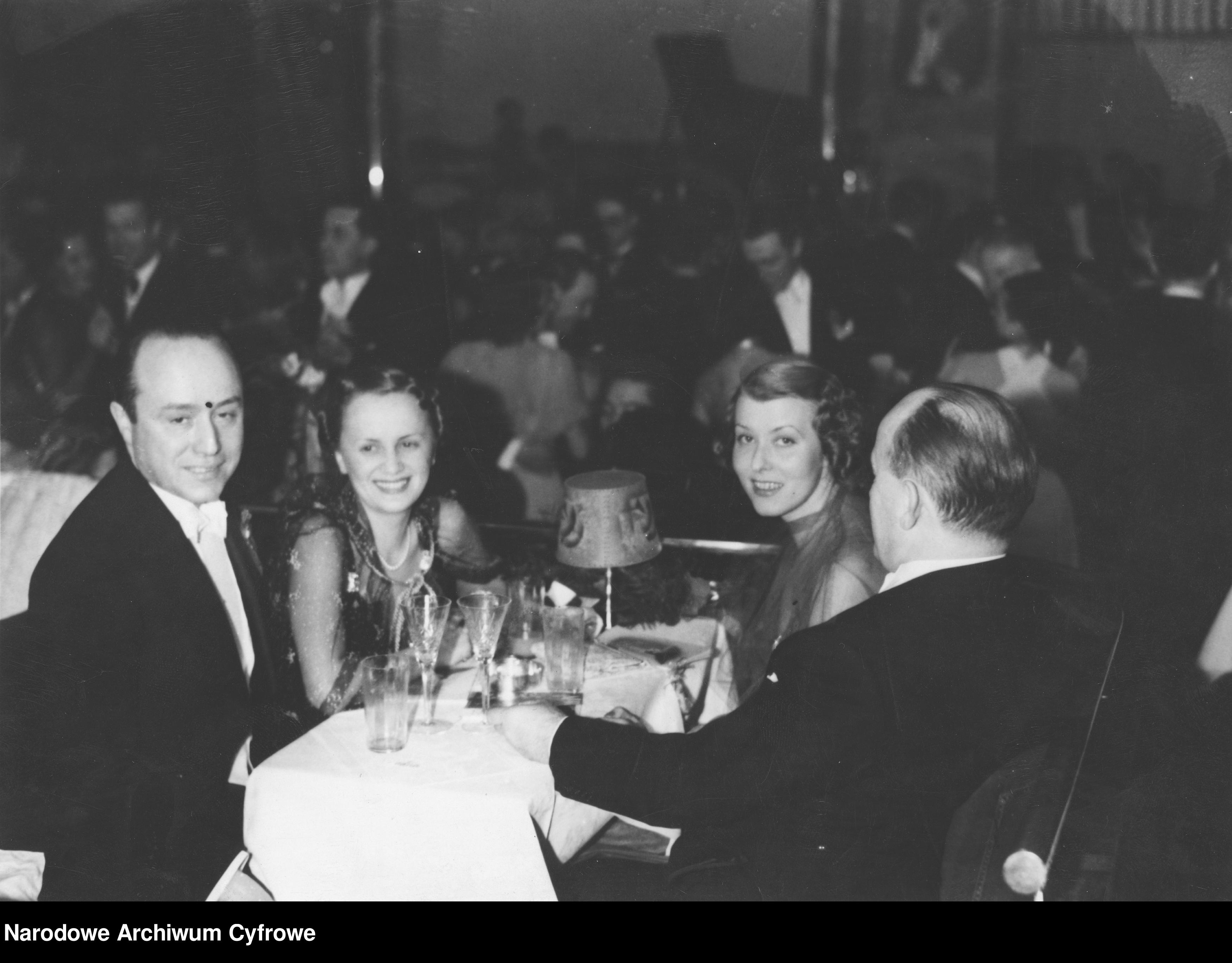 Grupa uczestników balu przy stoliku. Widoczne m.in. aktorki: Zofia Nakoneczna i Karolina Lubieńska (2. z lewej).